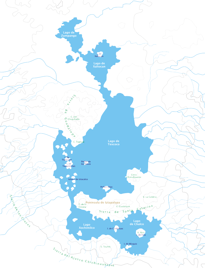 Mapa descriptivo del lago de Texcoco antes de su desecación